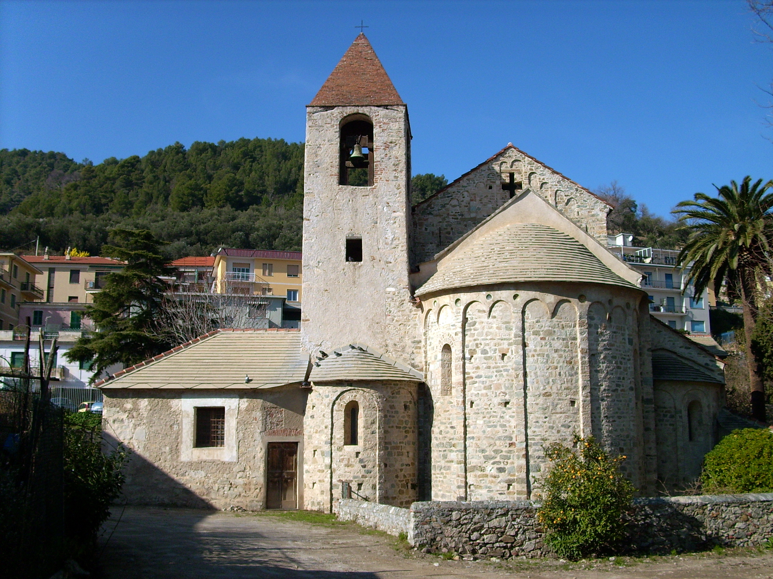 Cattedrale di San Paragorio di Noli, Liguria, Italy